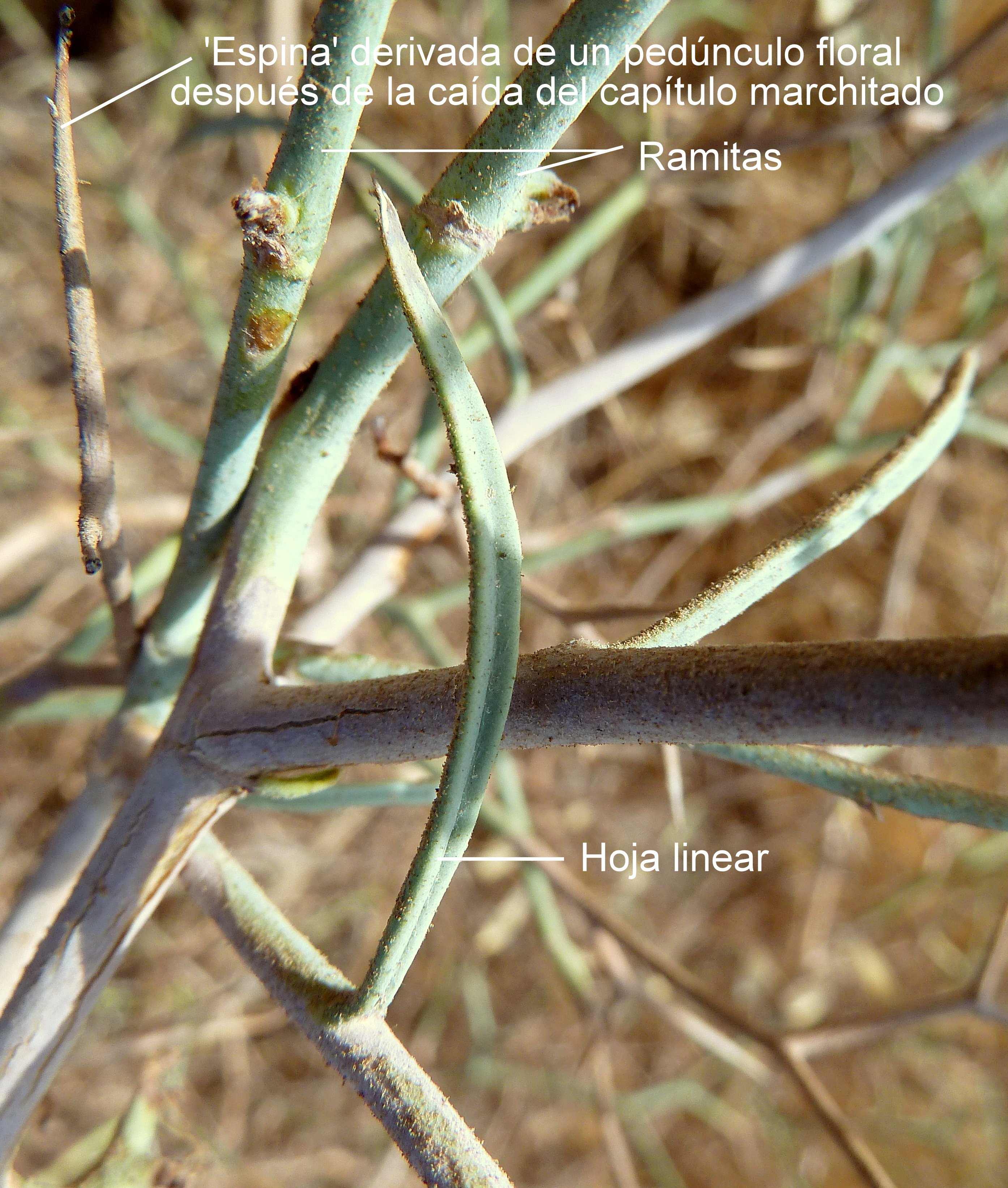 Launaea arborescens (Aulaga) : Detalle de las hojas lineares y las seudoespinas - Avenida Siempreverde, Águilas (Murcia, España).